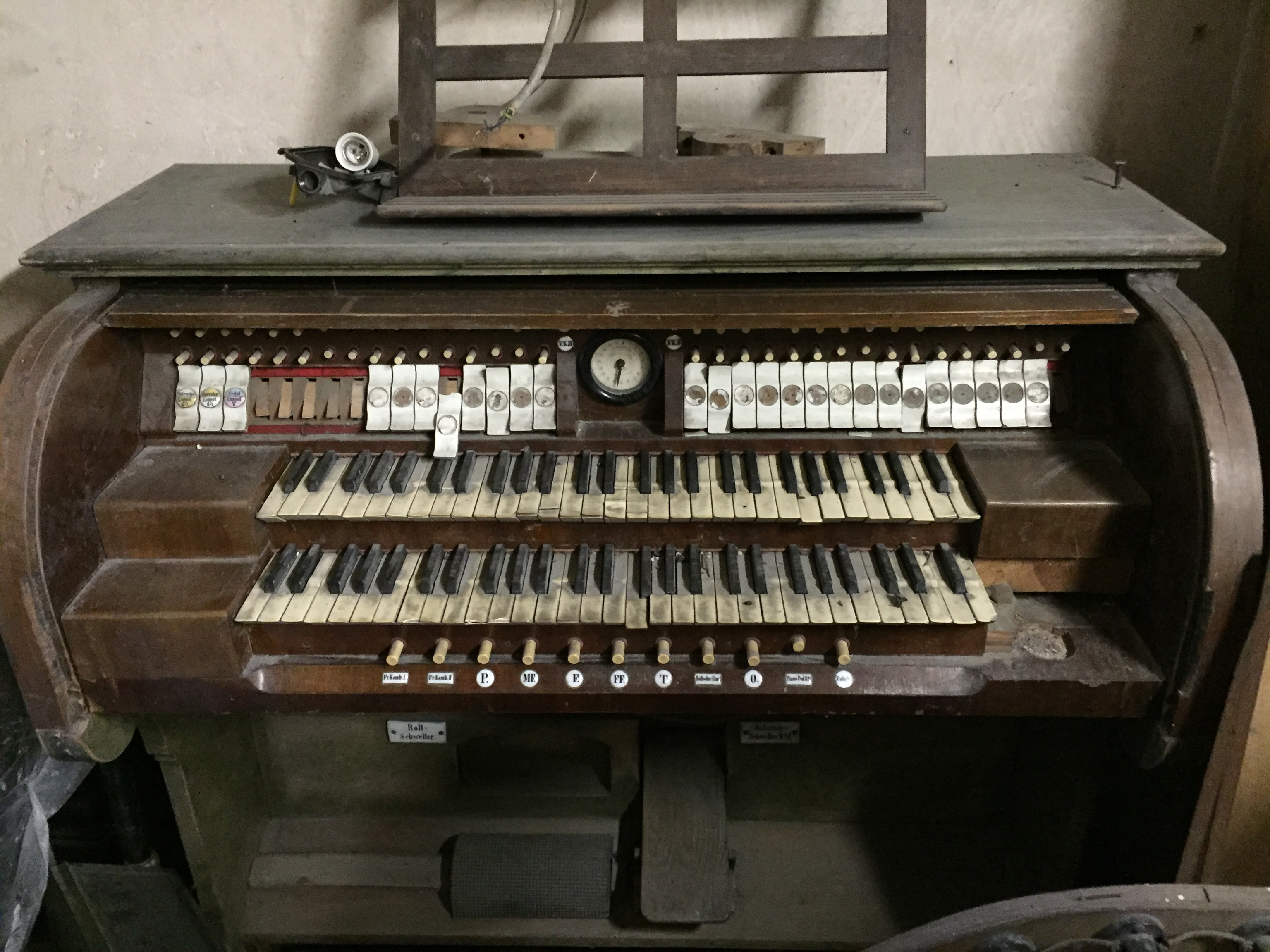 Originaler pneumatischer Spieltisch der Strebel-Orgel in St. Michael zu Stadtsteinach. Das Foto dokumentiert den Zustand 2017.